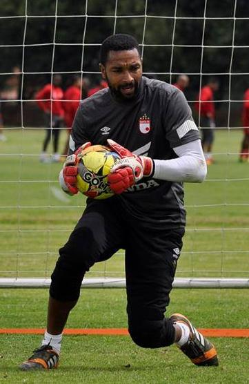 Robínson En Un Entrenamiento En Santa Fe